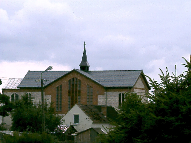 Sycewice, ul. Słupska 11 - rzymskokatolicki kościół parafialny pw. św. Jana Bosko, 1992.